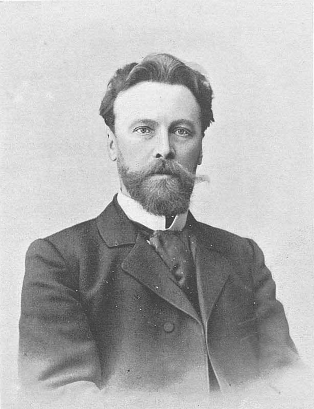 Виктор Андреевич Кудрявый, член Государственного Совета.